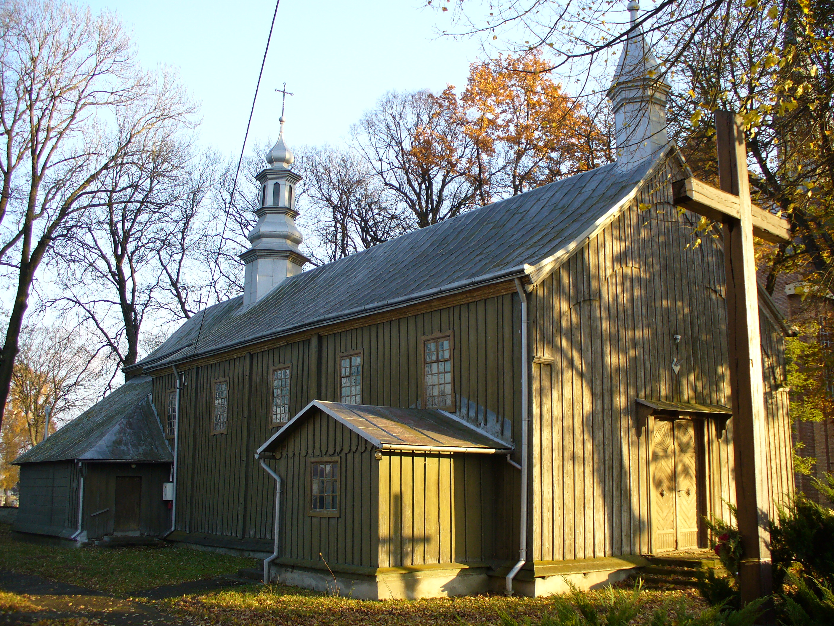 Besko 2